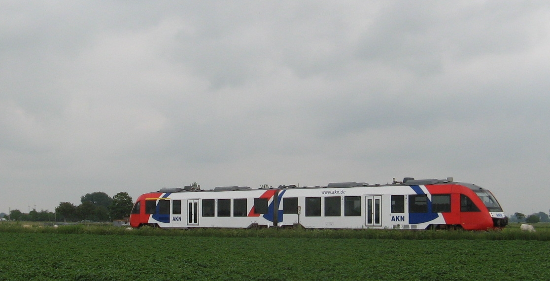 Schleswig-Holstein-Bahn train close to Oesterwurh-Jarrenwisch, Dithmarschen, Germany